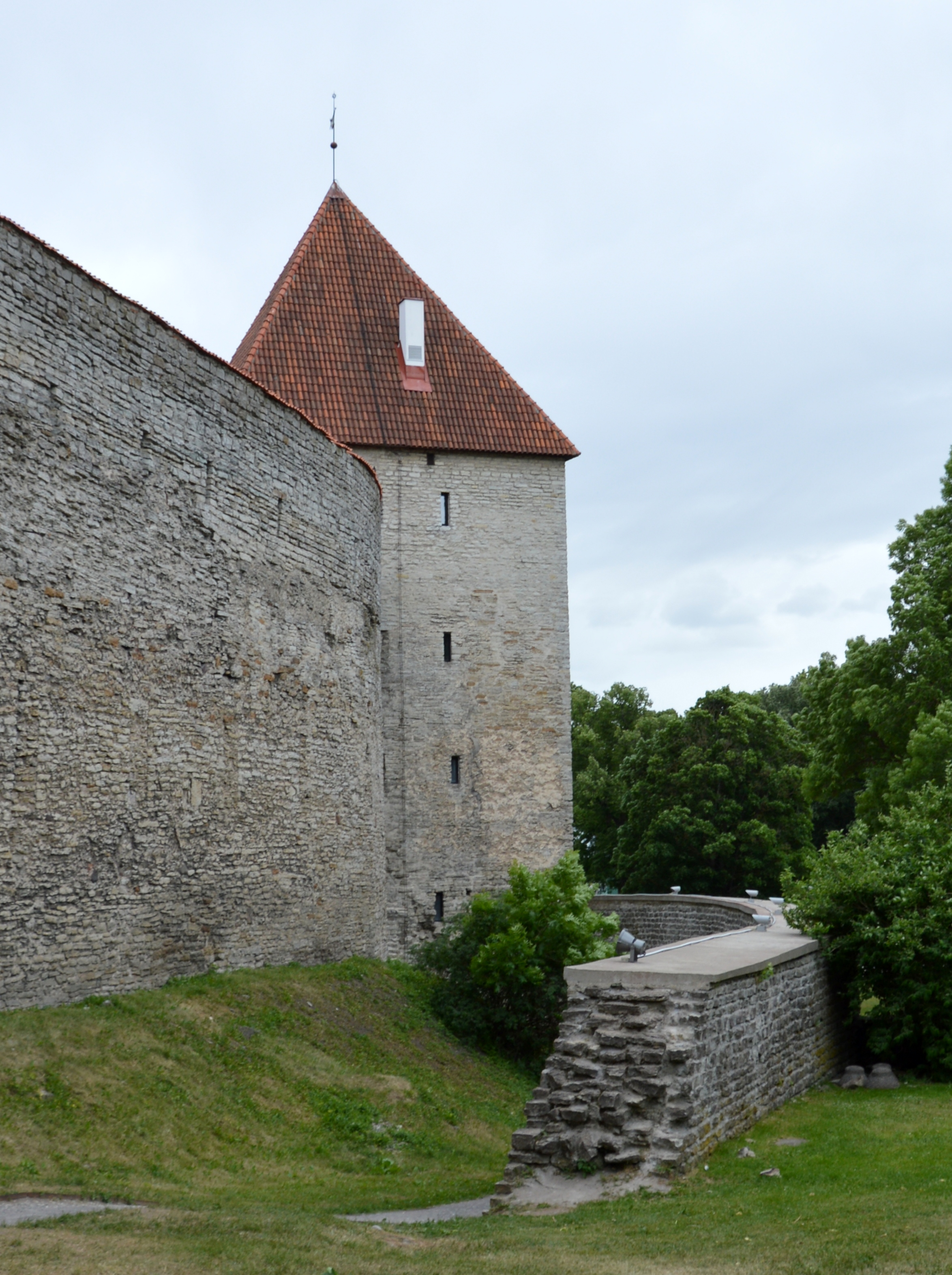 Mägdeturm Revaler Stadtbefestigung außen